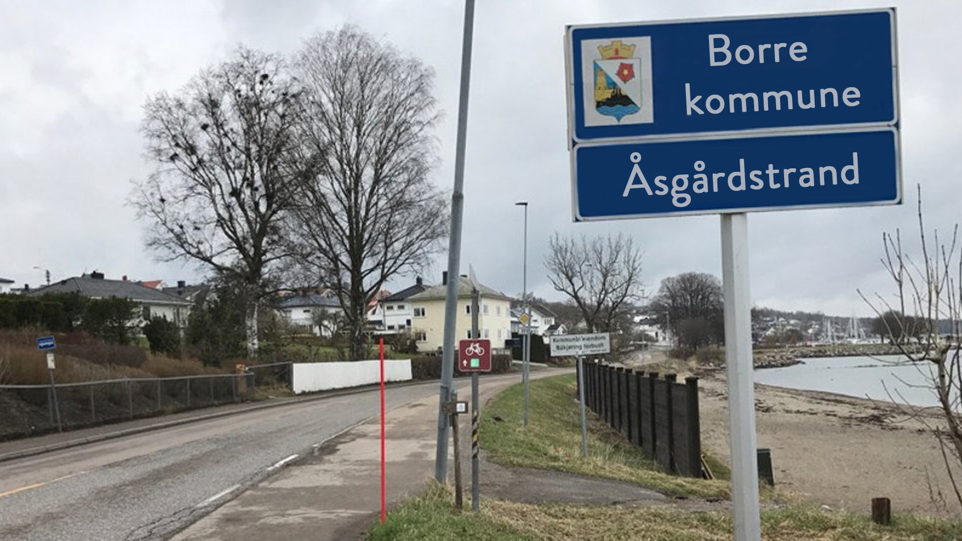 Borre kommune grense ved Åsgårdstrand by.